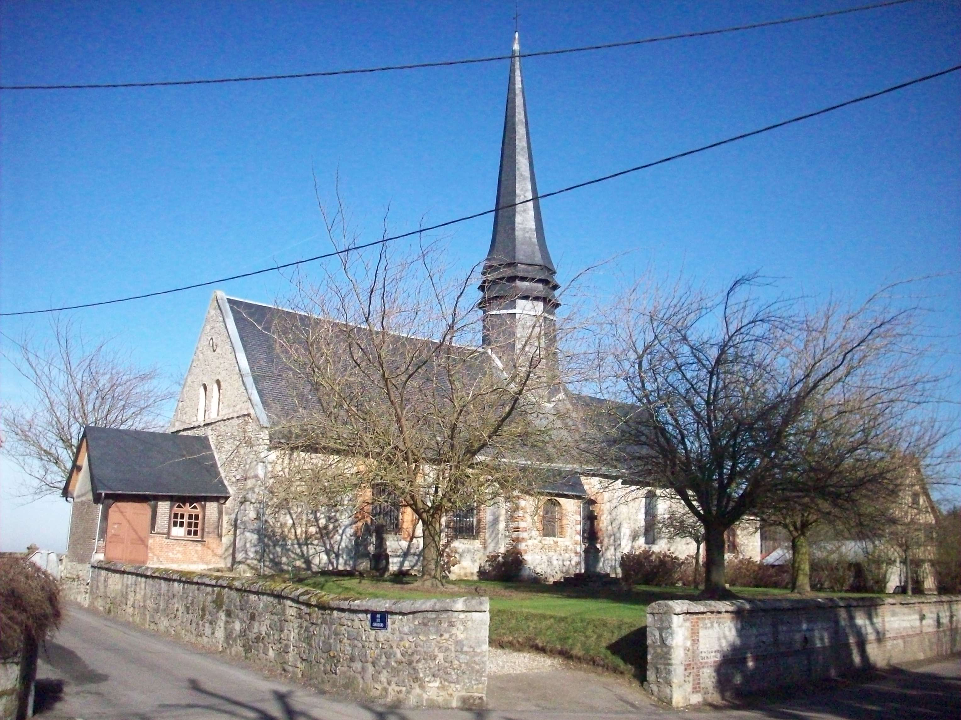 Église Sainte-Geneviève.